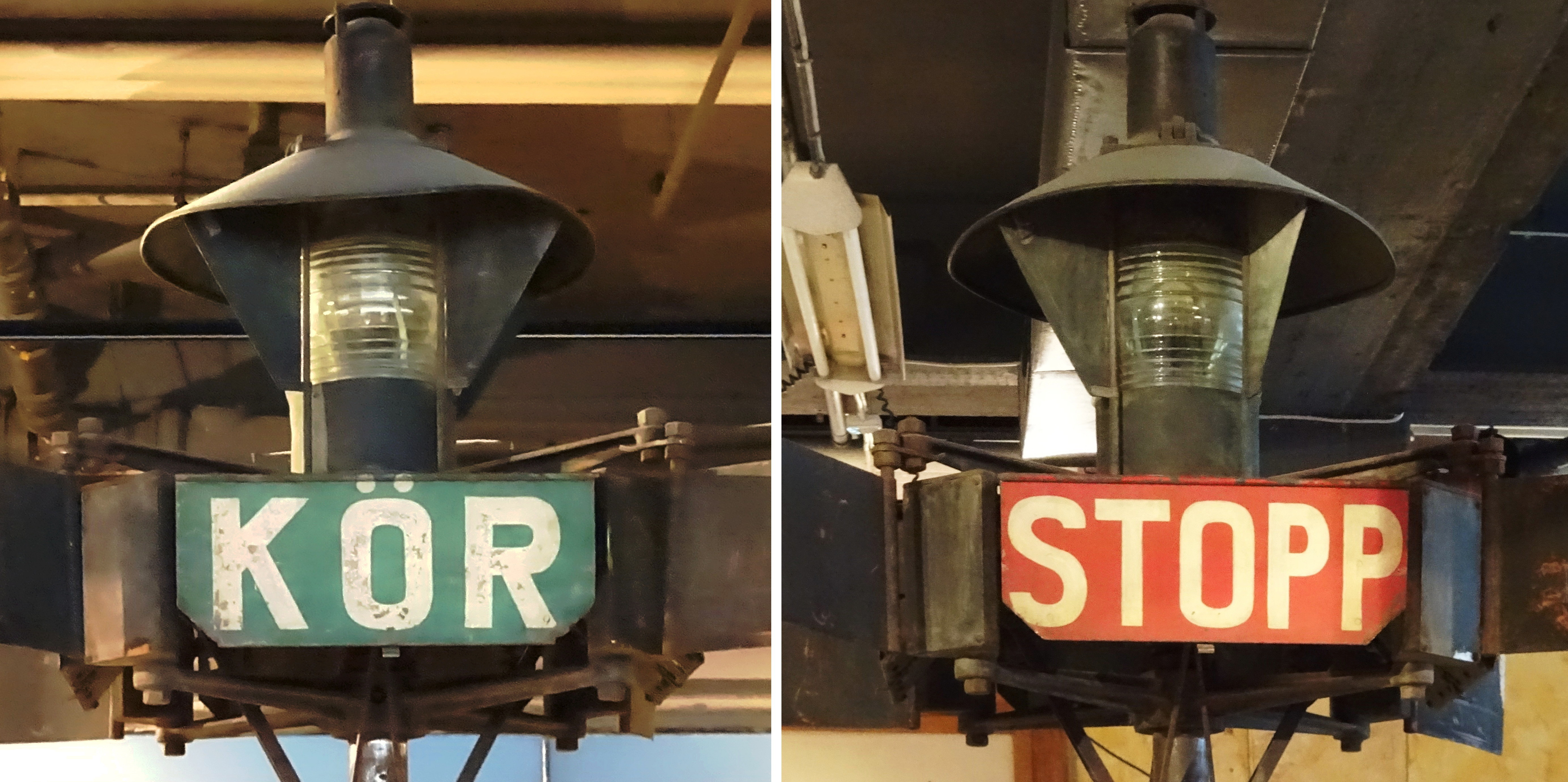 Trafikljus KÖR - STOPP i Spårvägsmuseet